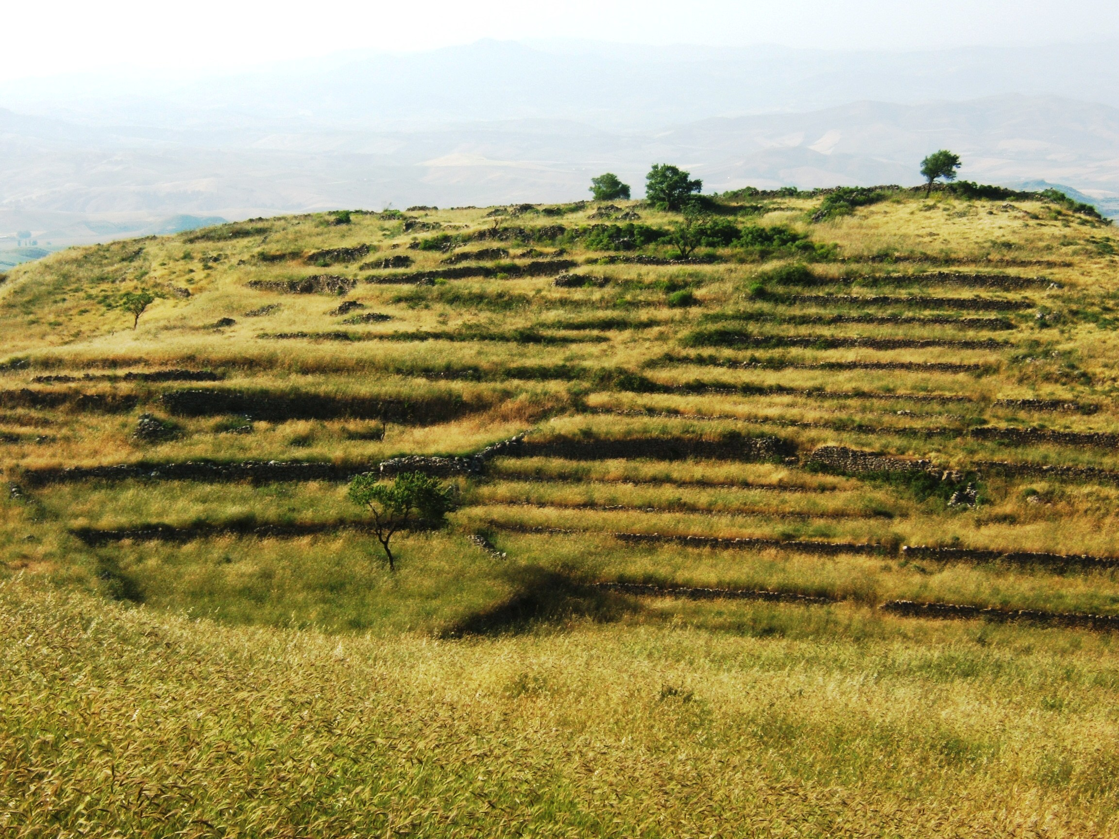 Valguarnera Caropepe - Alcune abitazioni sul Monte Rossomanno. Foto di proprietà di Carmelo Parrinelli